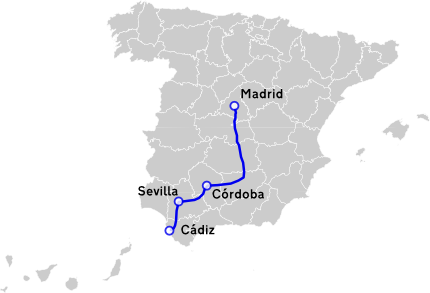 Localización de A-4